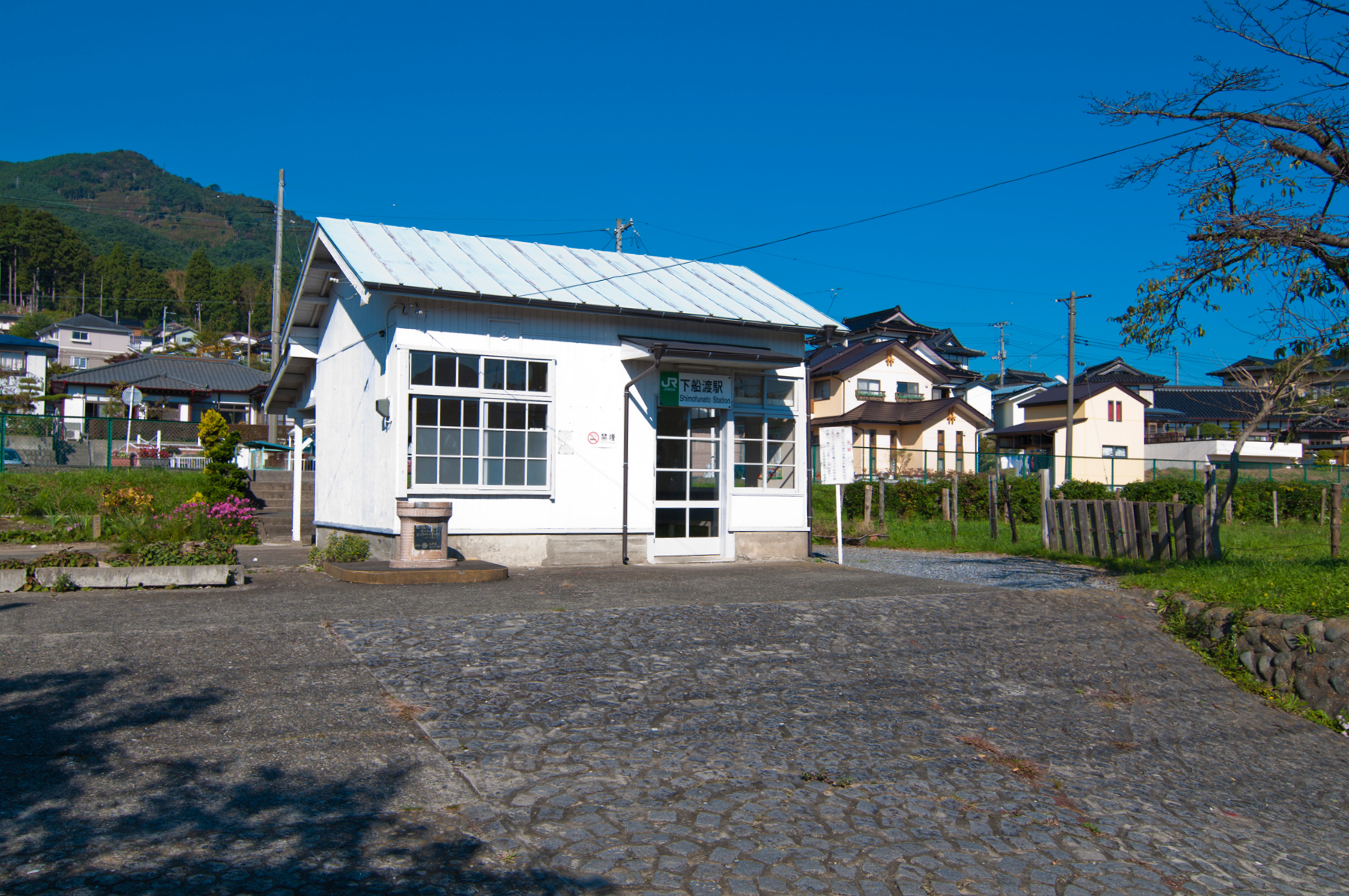 東日本旅客鉄道大船渡線下船渡駅